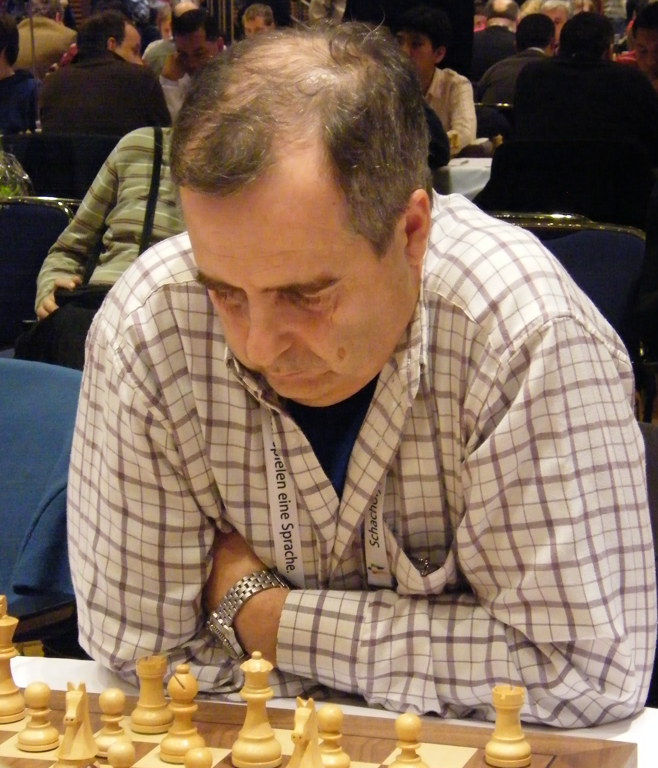 GM Daniel Campora bei der Schacholympiade 2008 in Dresden